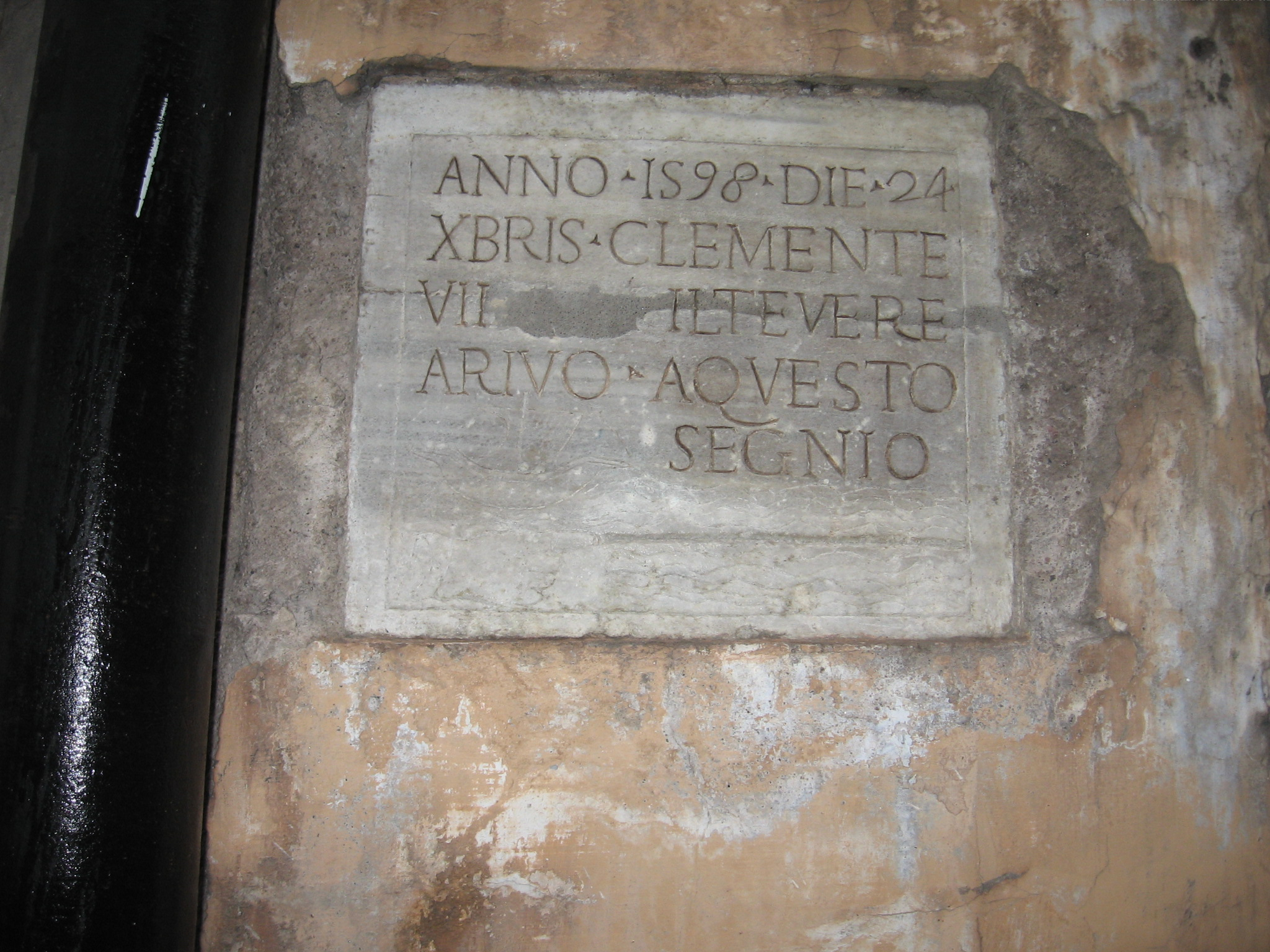 ביקור בגטו רומא בשנת 2008